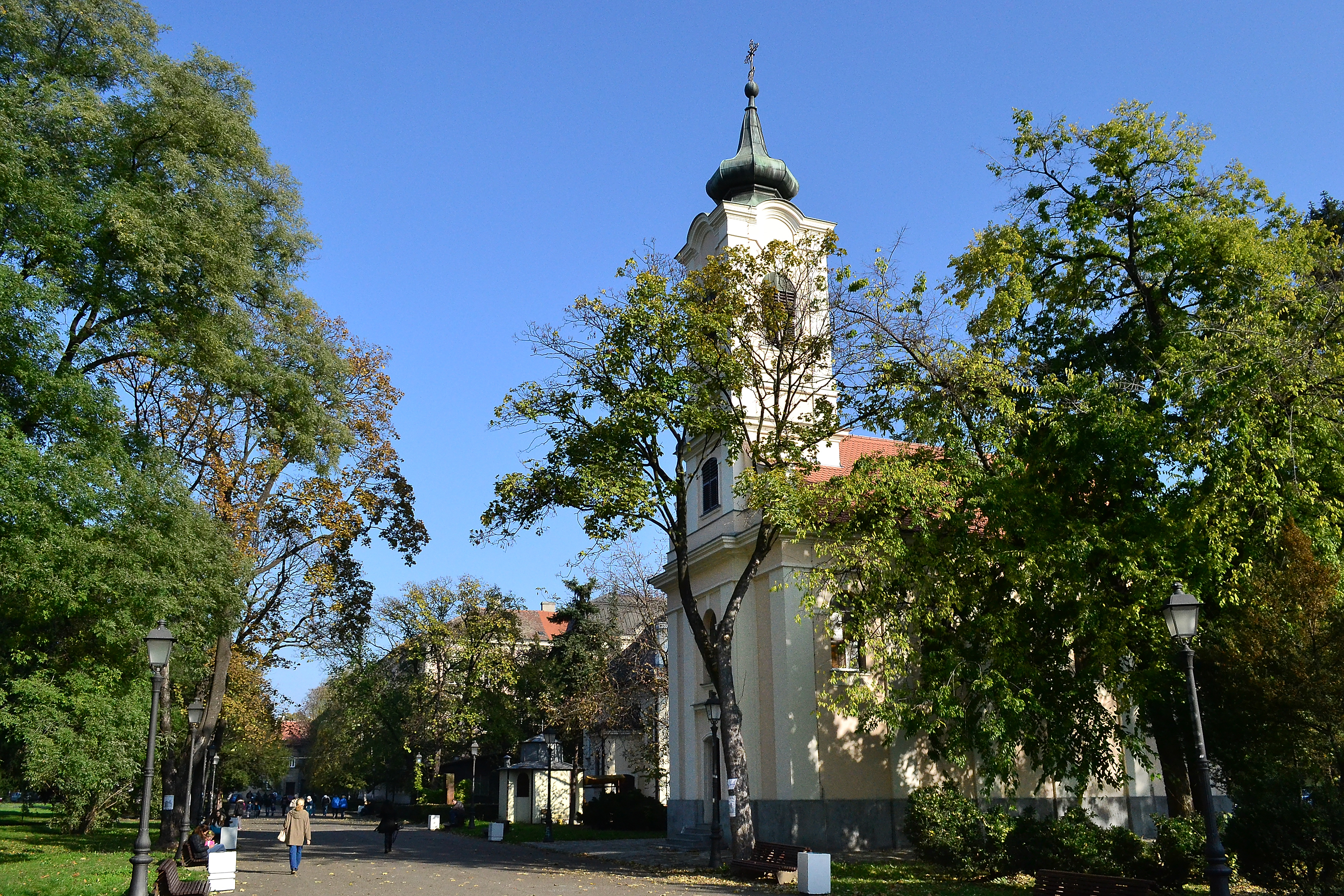 Контумацка црква Св. Рока, Земун